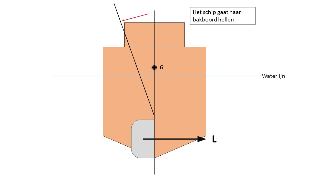 Het schip gaat naar bakboord hellen